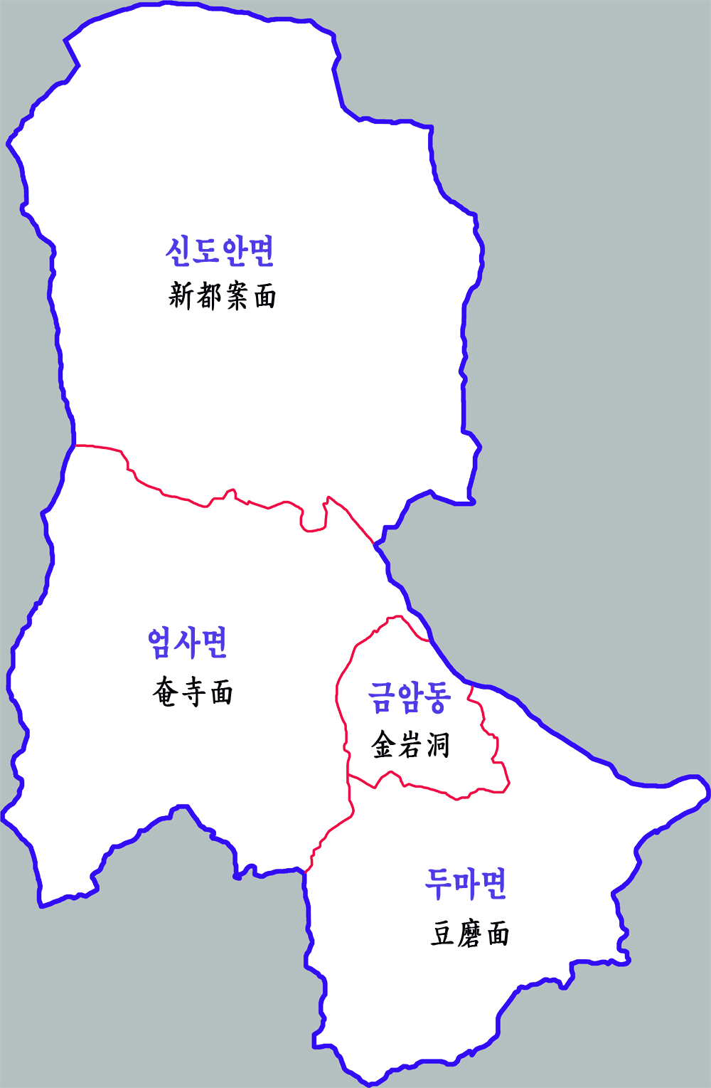 충남 계룡시 행정구역도